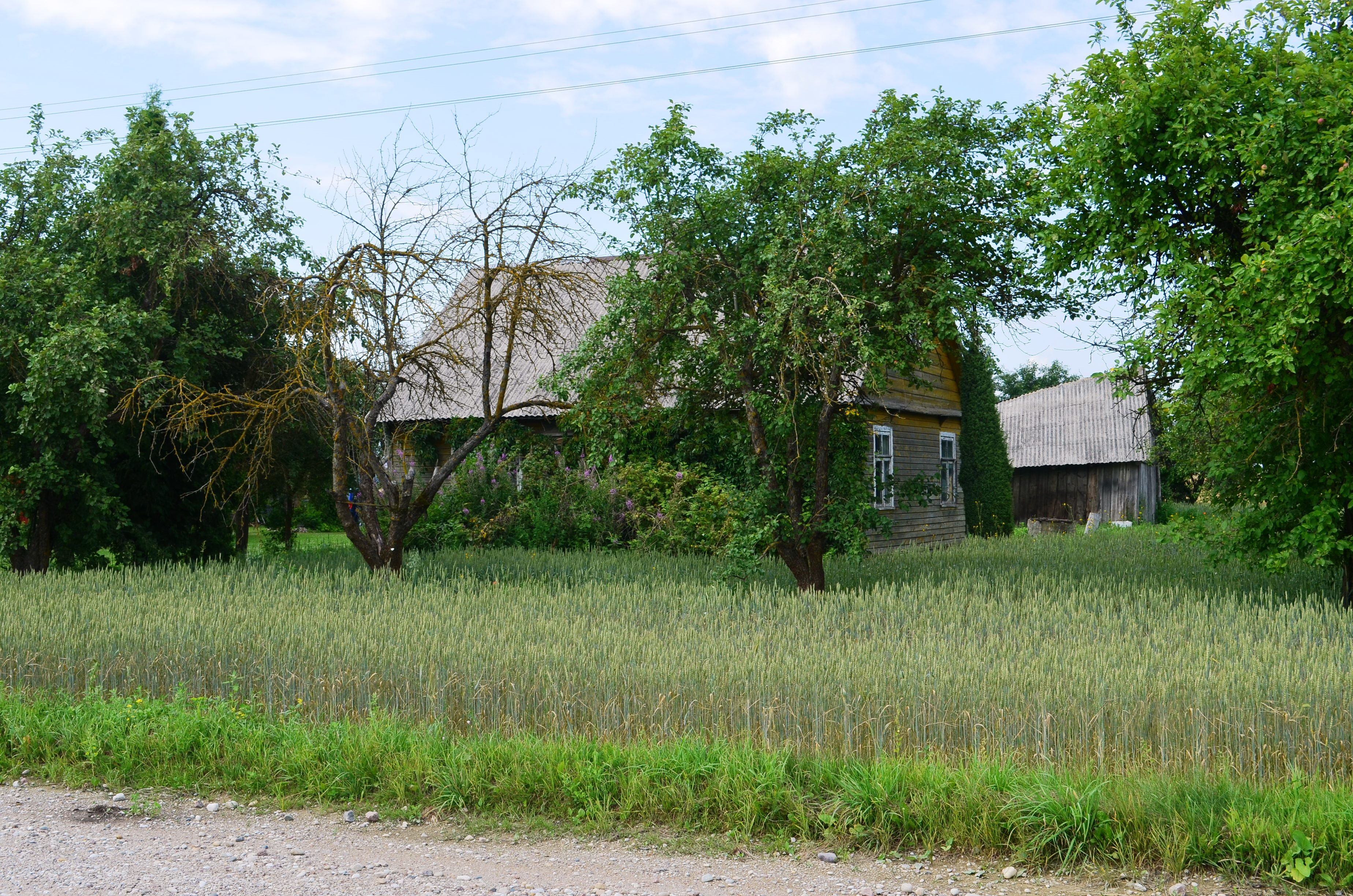 Sodyba, Mociūnai, Kėdainių raj.